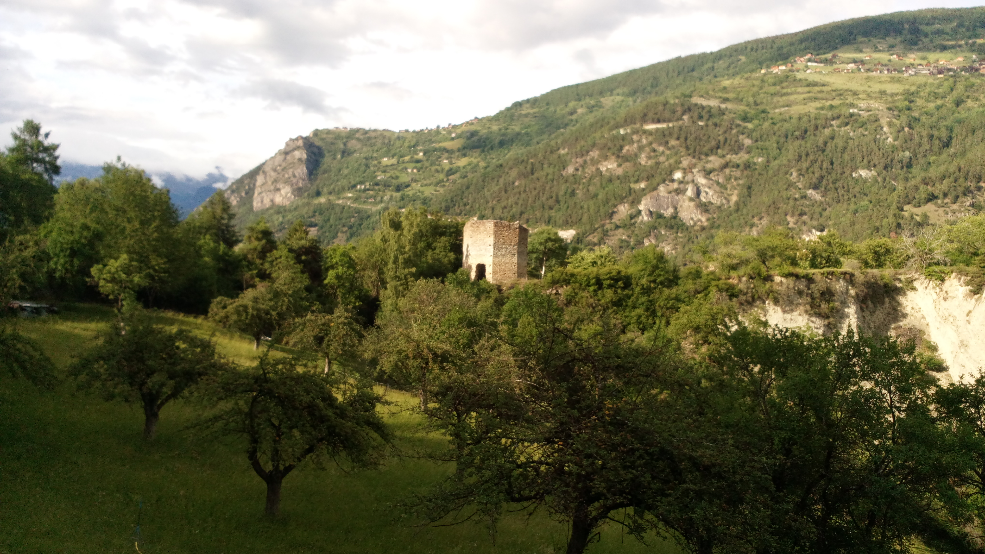 La ruine de la tour Tavelli à Vex en Valis (Suisse romande).